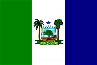 Bandeira de Parazinho, Rio Grande do Norte, Brasil.